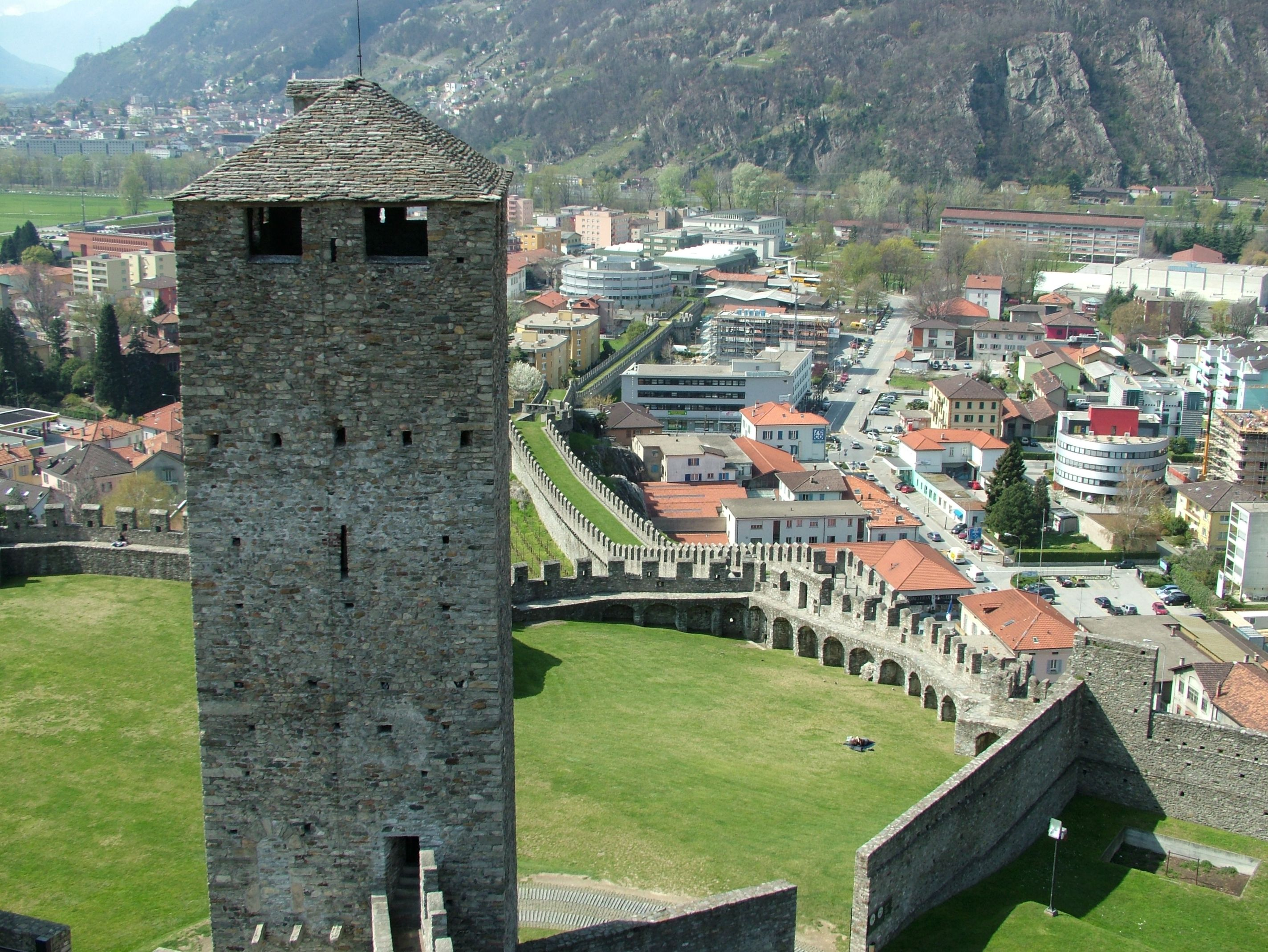 Bellinzona, die Murata